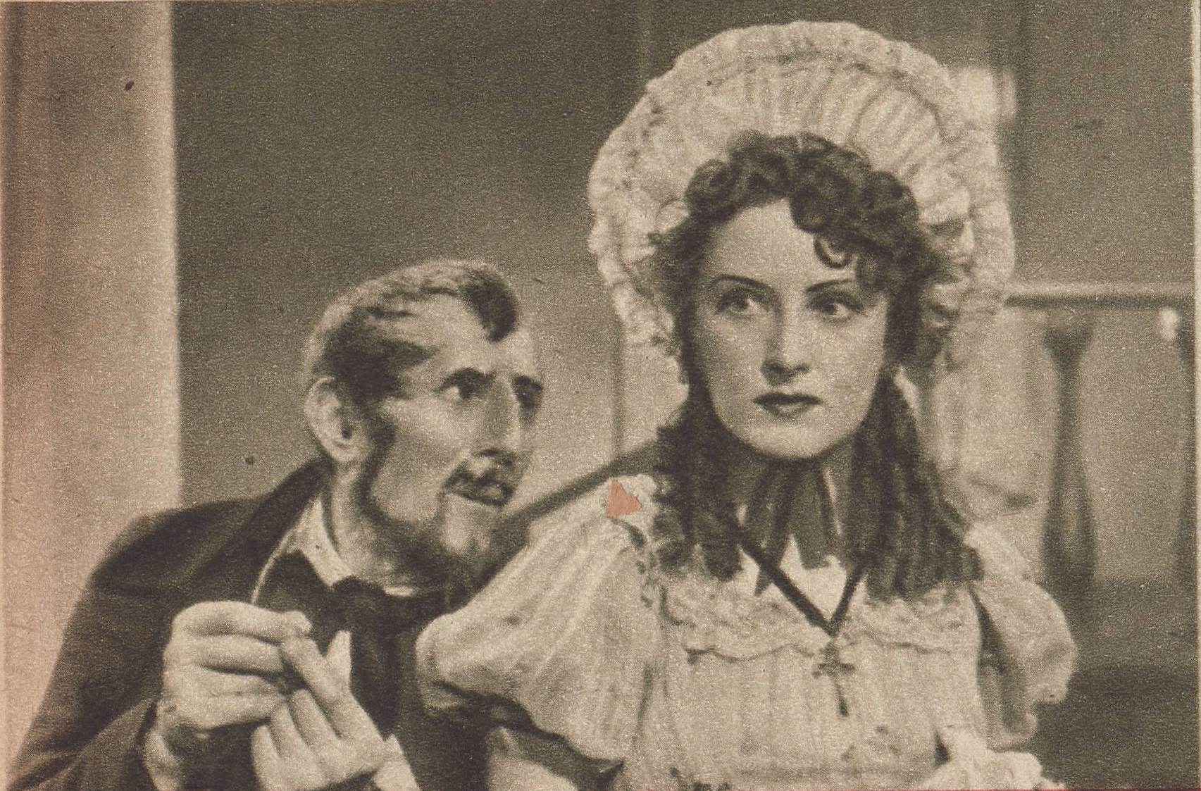 Ludwik Solski i Stanisława Angel-Engelówna w sztuce "Dożywocie", z filmu Geniusz sceny